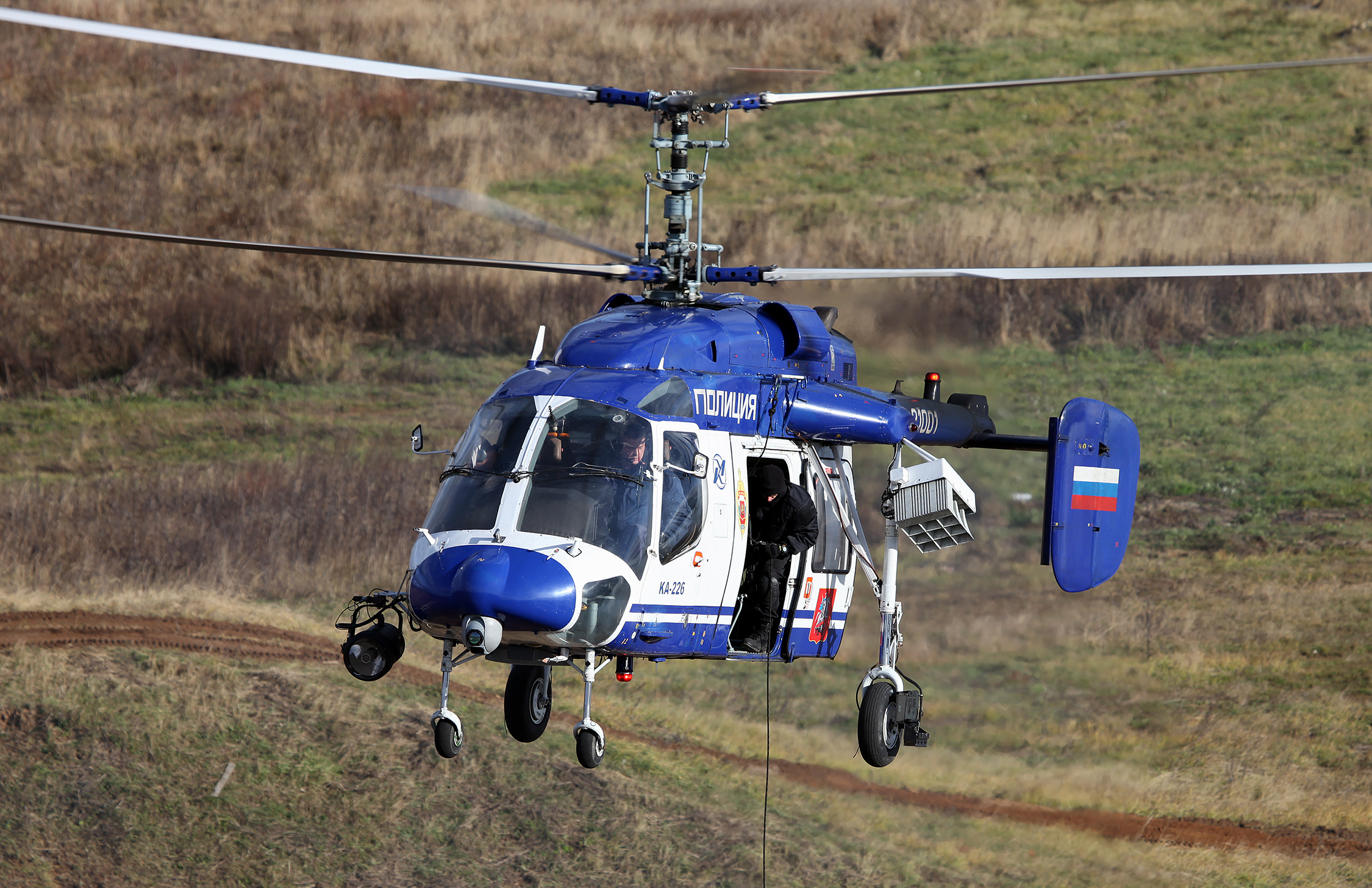 Сотрудники СОБР Рысь Центра специального назначения сил оперативного реагирования и авиации МВД России (ЦСН СР МВД России) продемонстрировали порядок задержания вооруженных преступников, передвигающихся на автомобиле. Ка-226 высаживает группу СОБР Рысь (SOBR Rys' operators demonstrated the arrest of armed suspects in cargo truck with the help of aviation and explosives. Ka-226 landed a group of SOBR Rys')